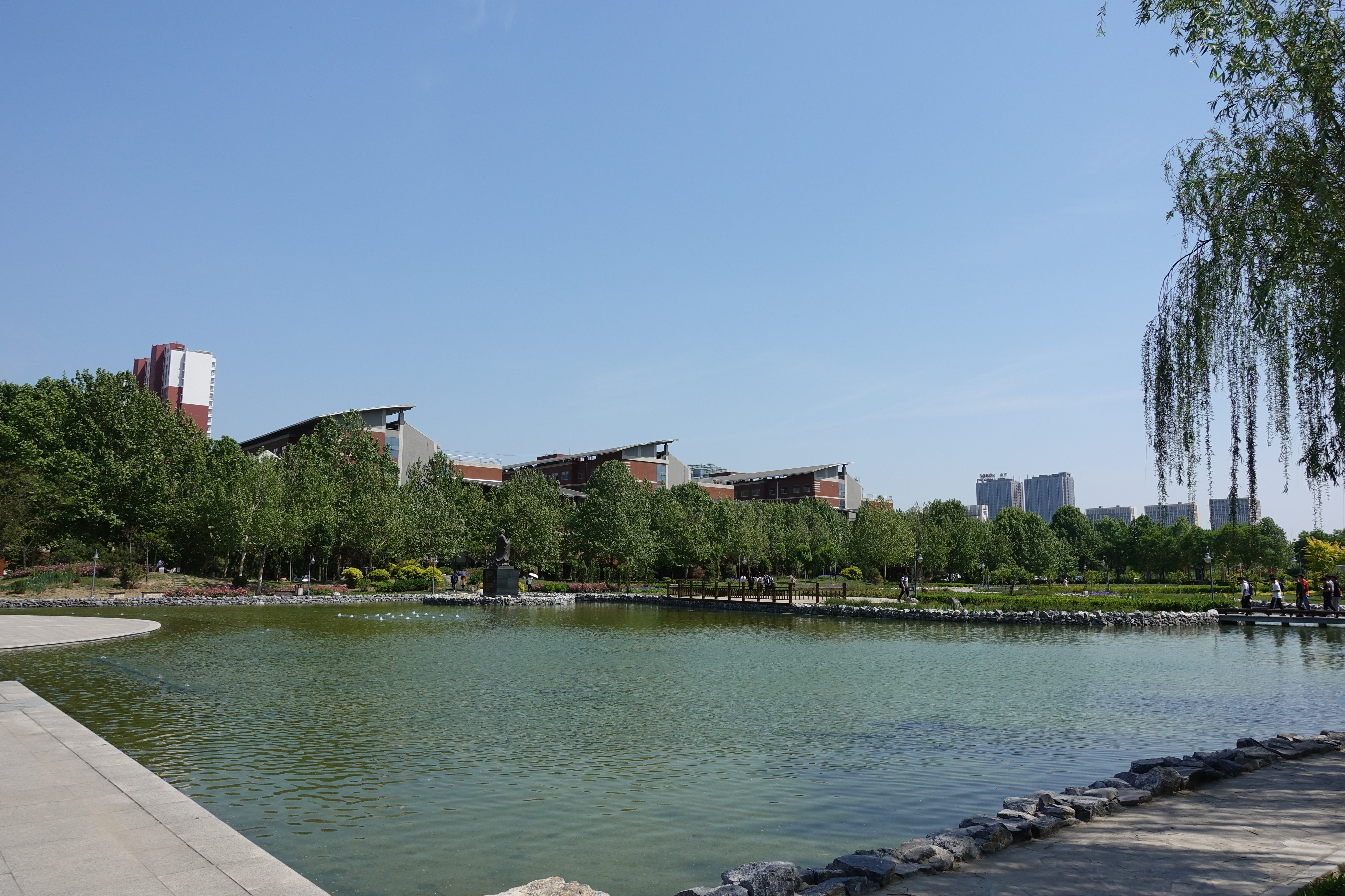 河北大学新区校园内部，河北省保定市。